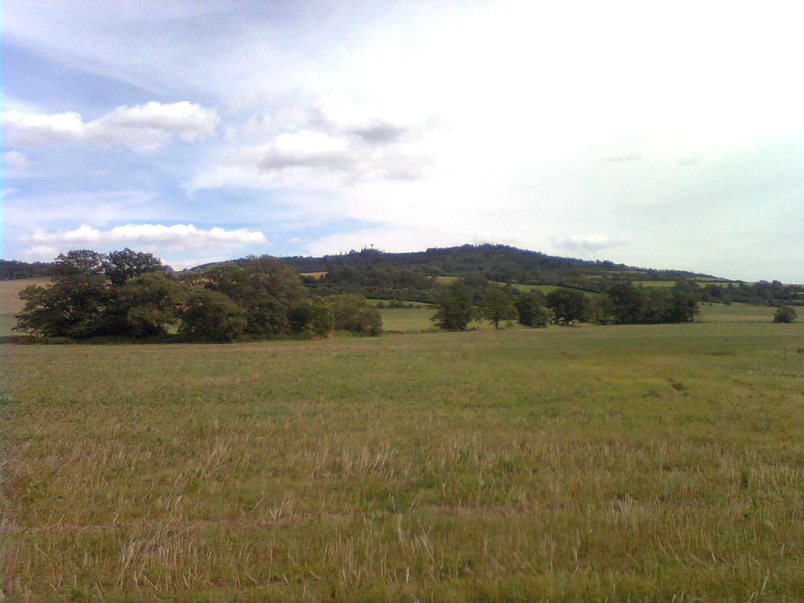 Widok z drgi Město Albrechtice - Slezské Rudoltice na Graniczną Górę